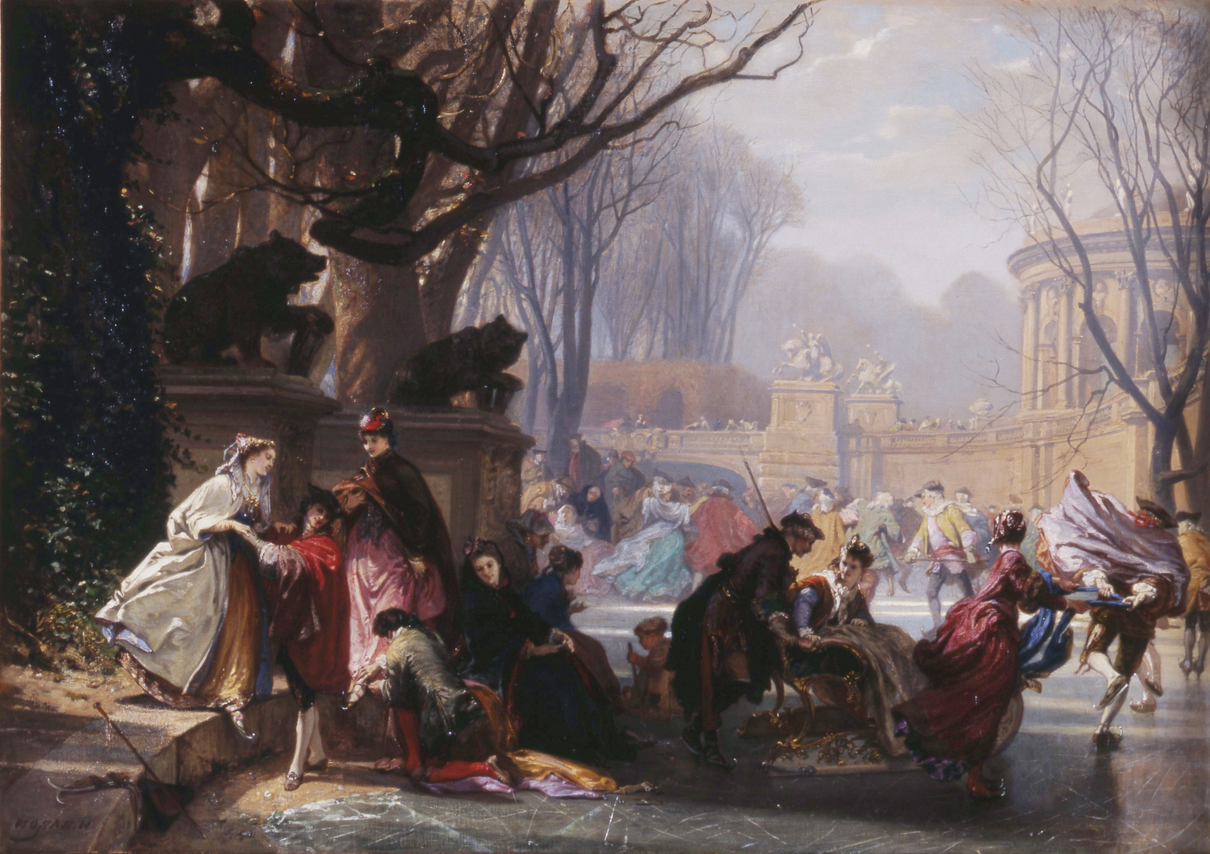 Les Patineurs